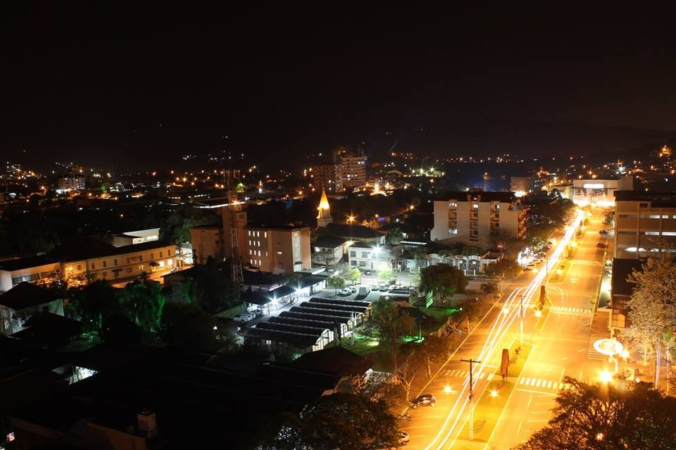 Noite em Igrejinha, Brasil. Night in Igrejinha, Brazil.